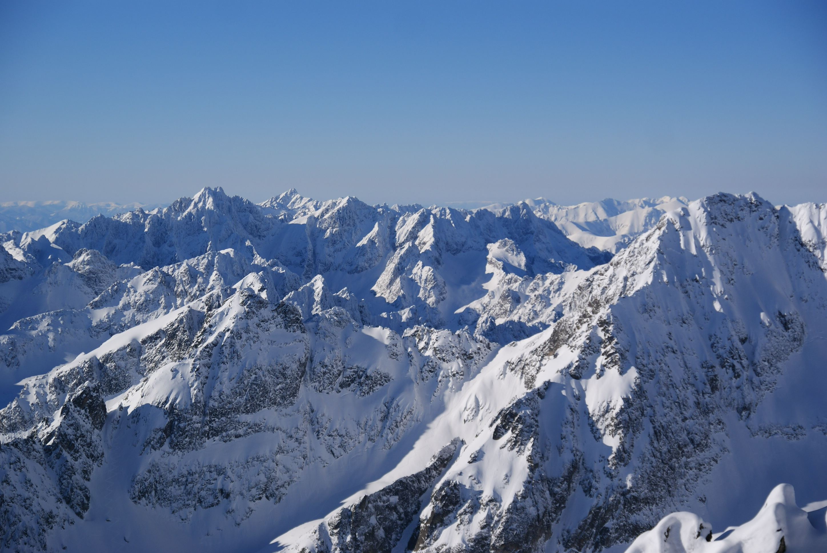 STANICA LANOVKY S OBSERVATÓRIOM